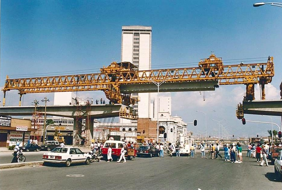 Construccion Metro de Medellín